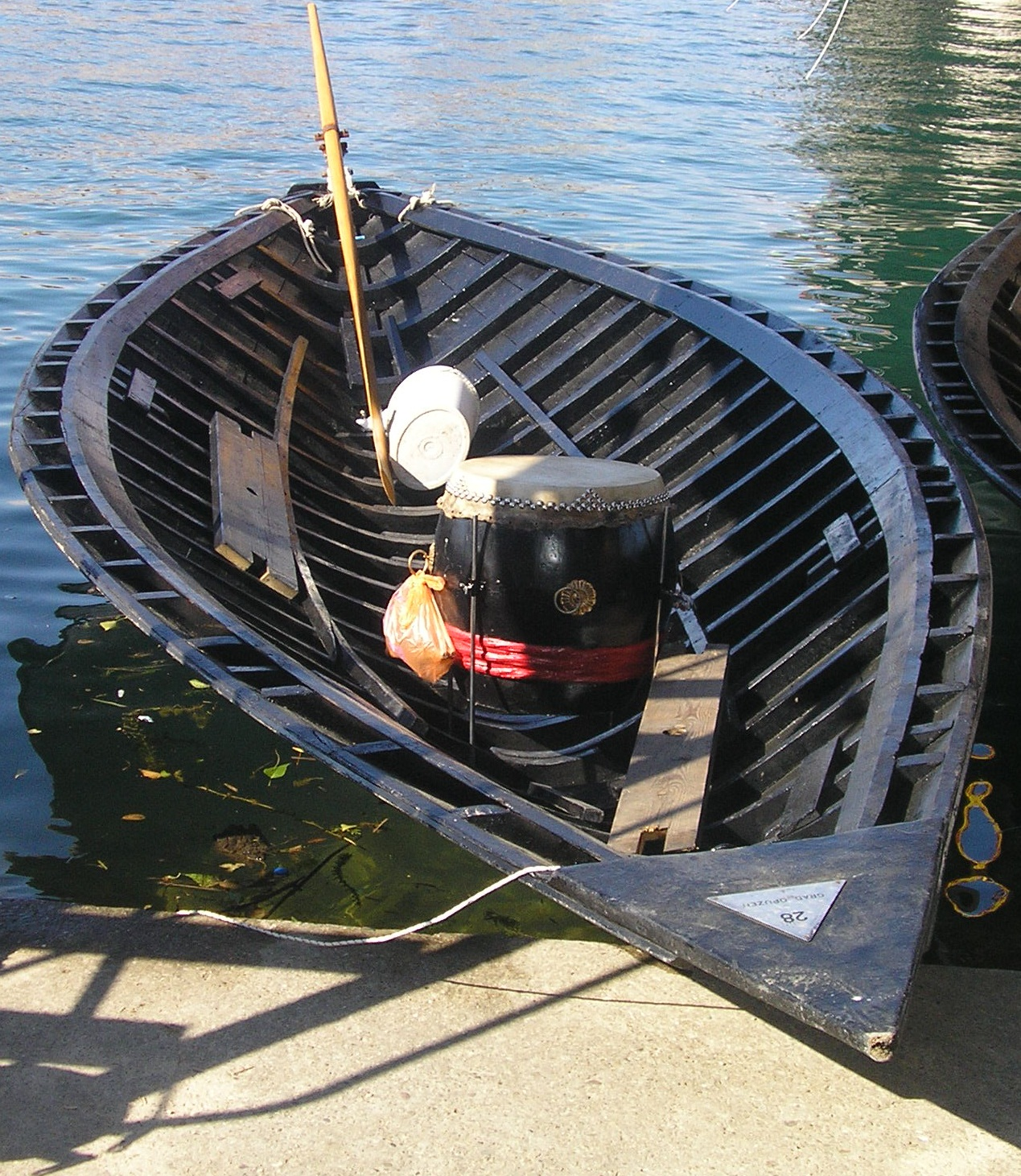 Neretvanska lađa